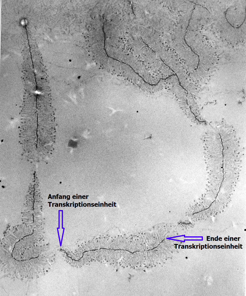 Elektronenmikroskopische Aufnahme ribosomaler Transkriptionseinheiten von Chrironumus pallidivitatus. Vergrößerung: 40.000x.